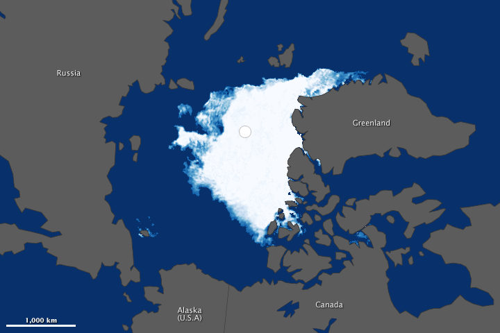 Минимум арктических льдов в 2012 году - рекордный минимум с момента непрерывных космических наблюдений. Изображение сделано на основании данных японского спутника ДЗЗ «Сидзуку», яп. しずく, Shizuku, GCOM-W1 (англ. Global Change Observation Mission — Water 1).